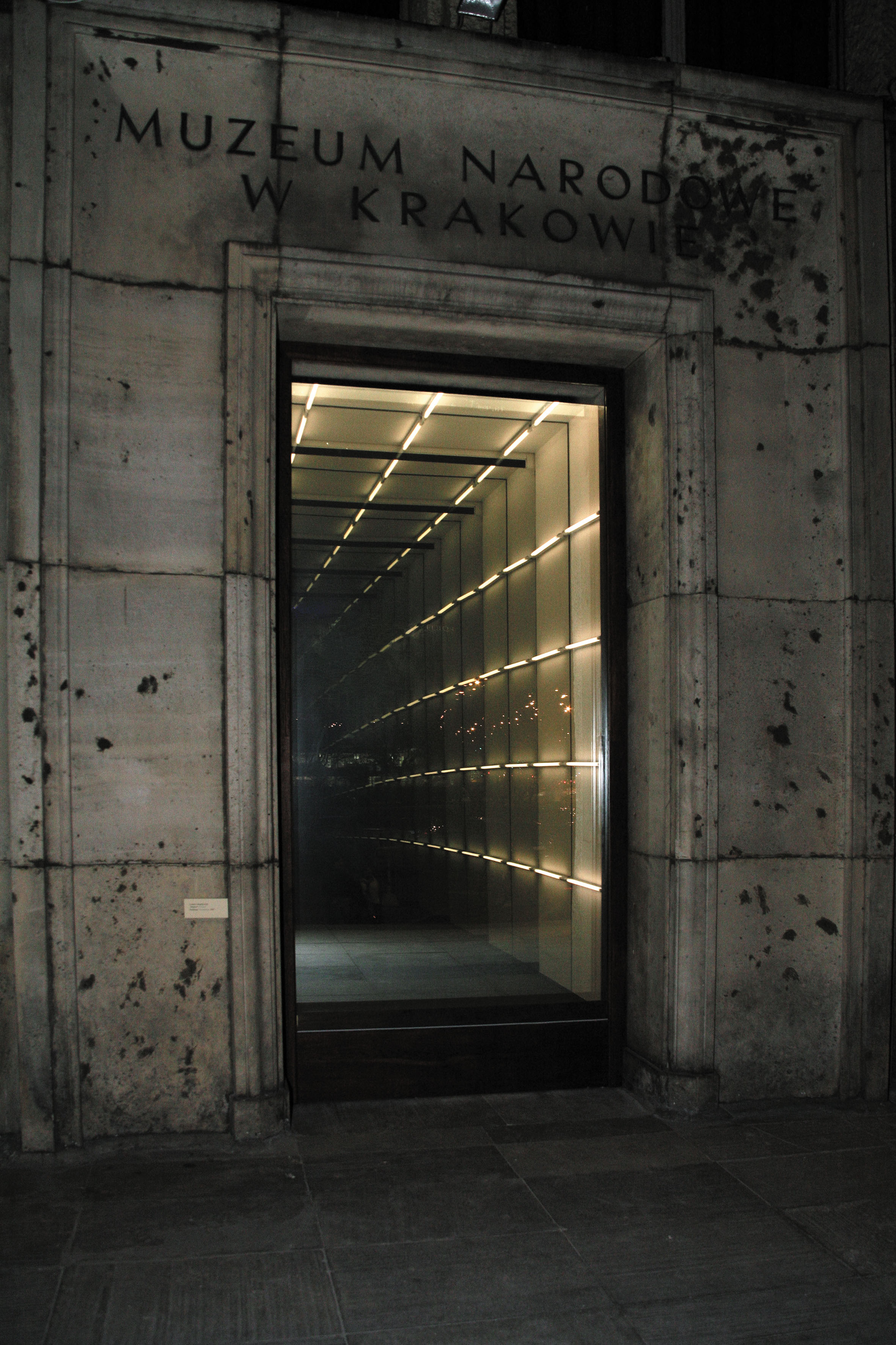 Leszek Lewandowski 2007, instalacja Muzeum Narodowe w Krakowie